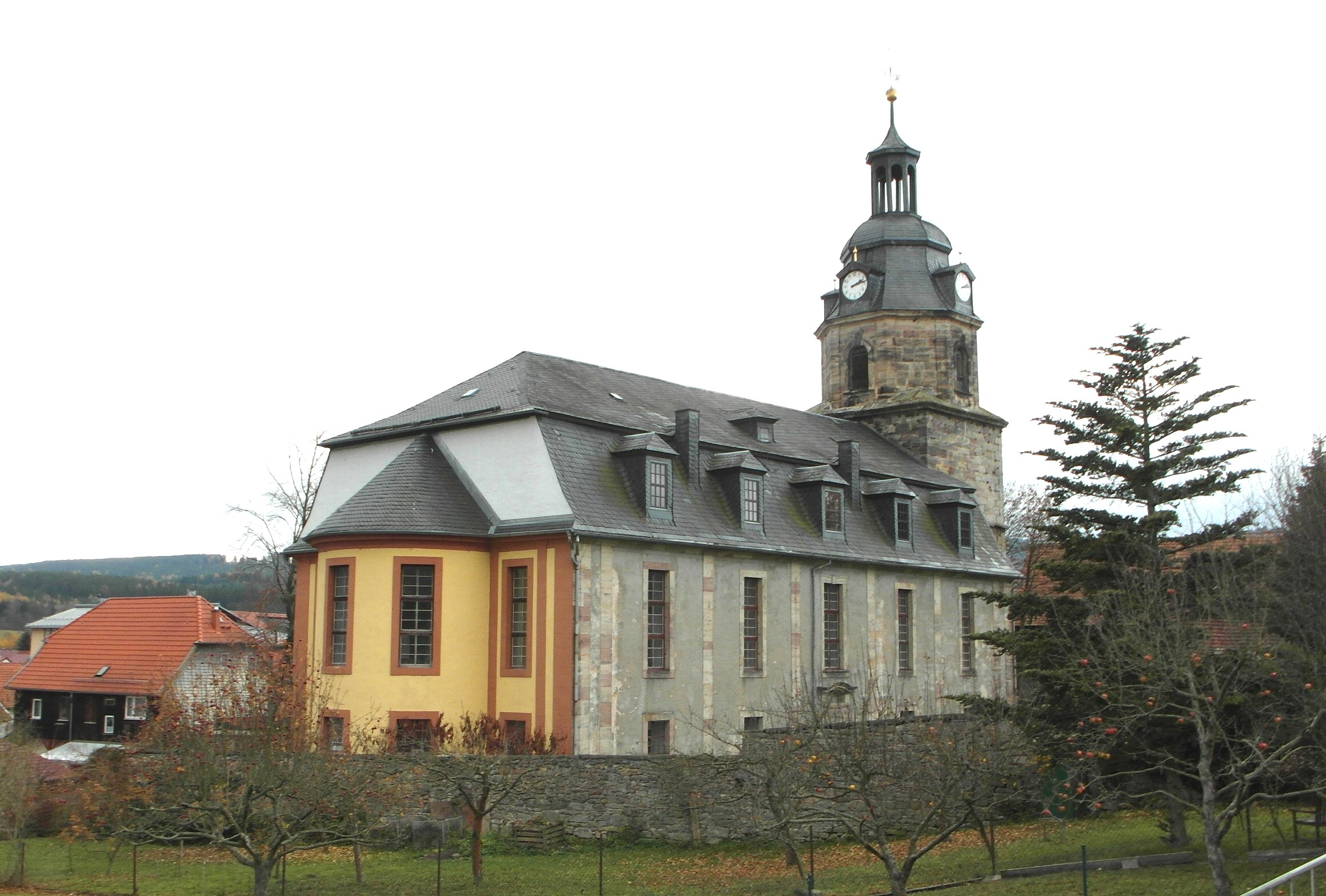 Gräfenroda St. Laurentius von Norden